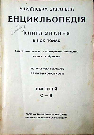 Украинская универсальная энциклопедия, титульный лист 1 тома.